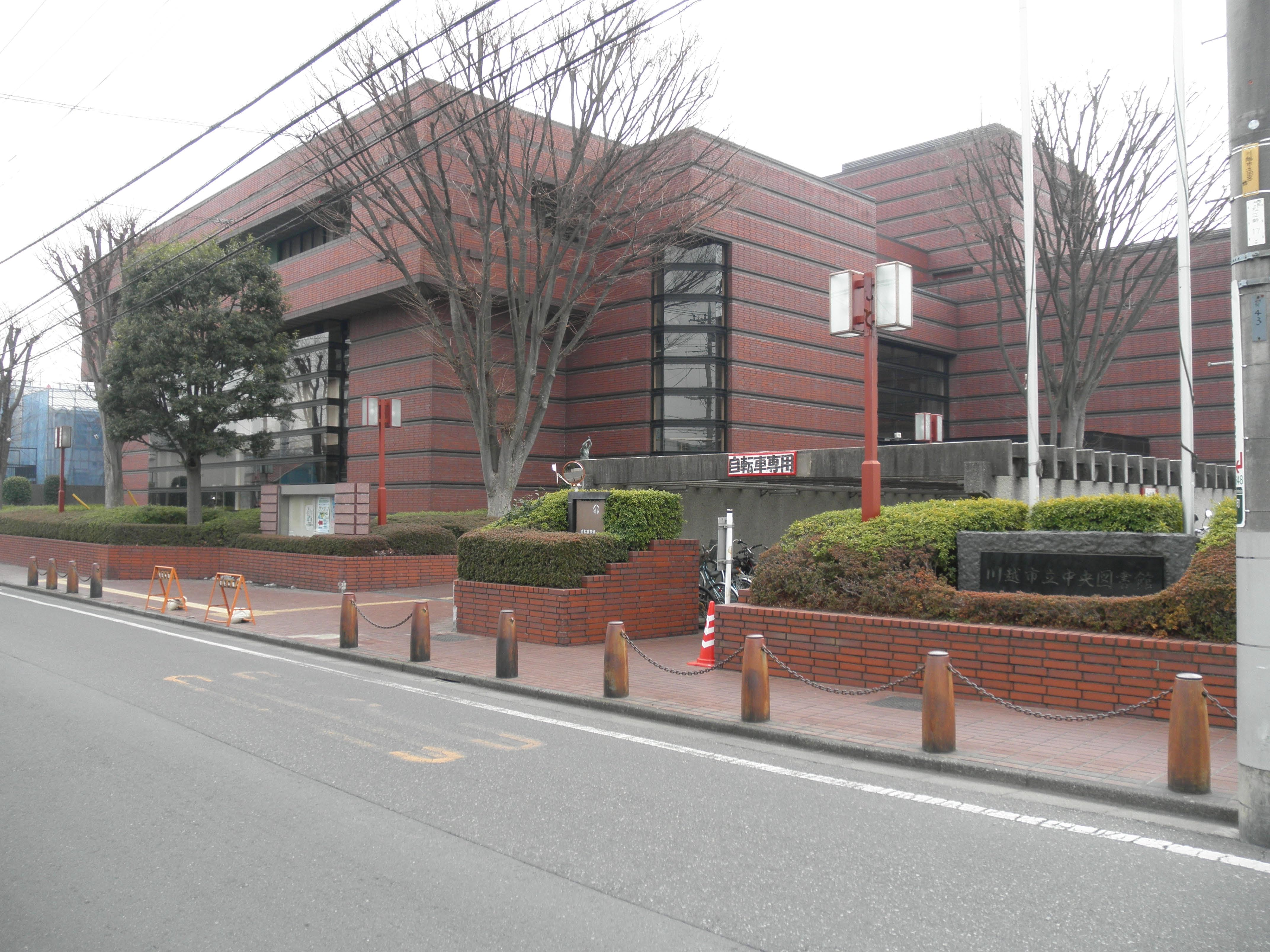 川越市立中央図書館